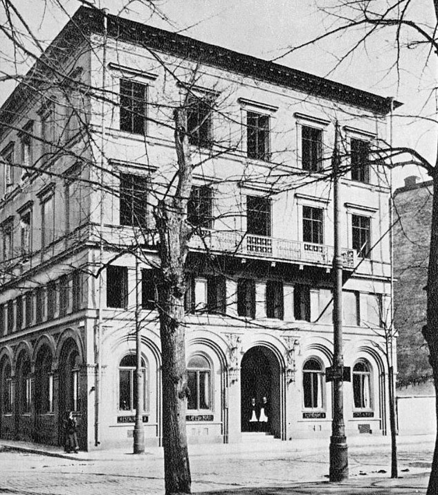 du Nord, april 1911 på Kungsträdgårdsgatan strax innan rivningen